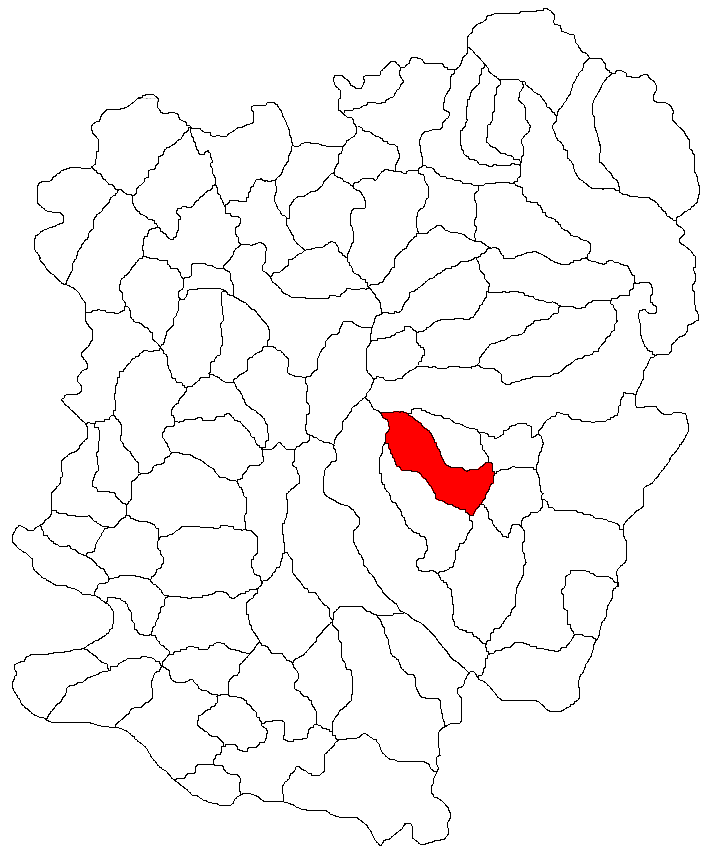 Categorie:Hărţi ale judeţului Caraş-Severin